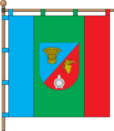 прапор села Голиця